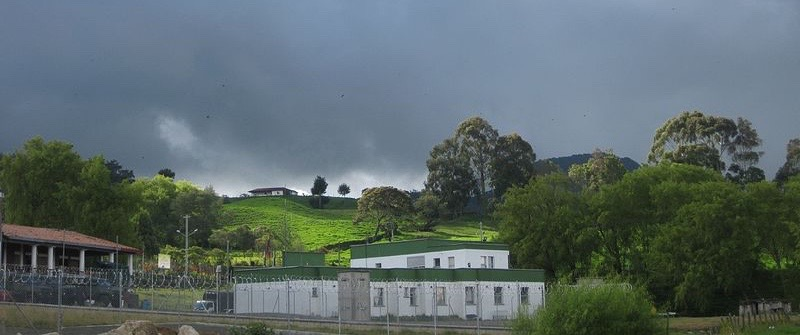 Comando de policía de Sonsón